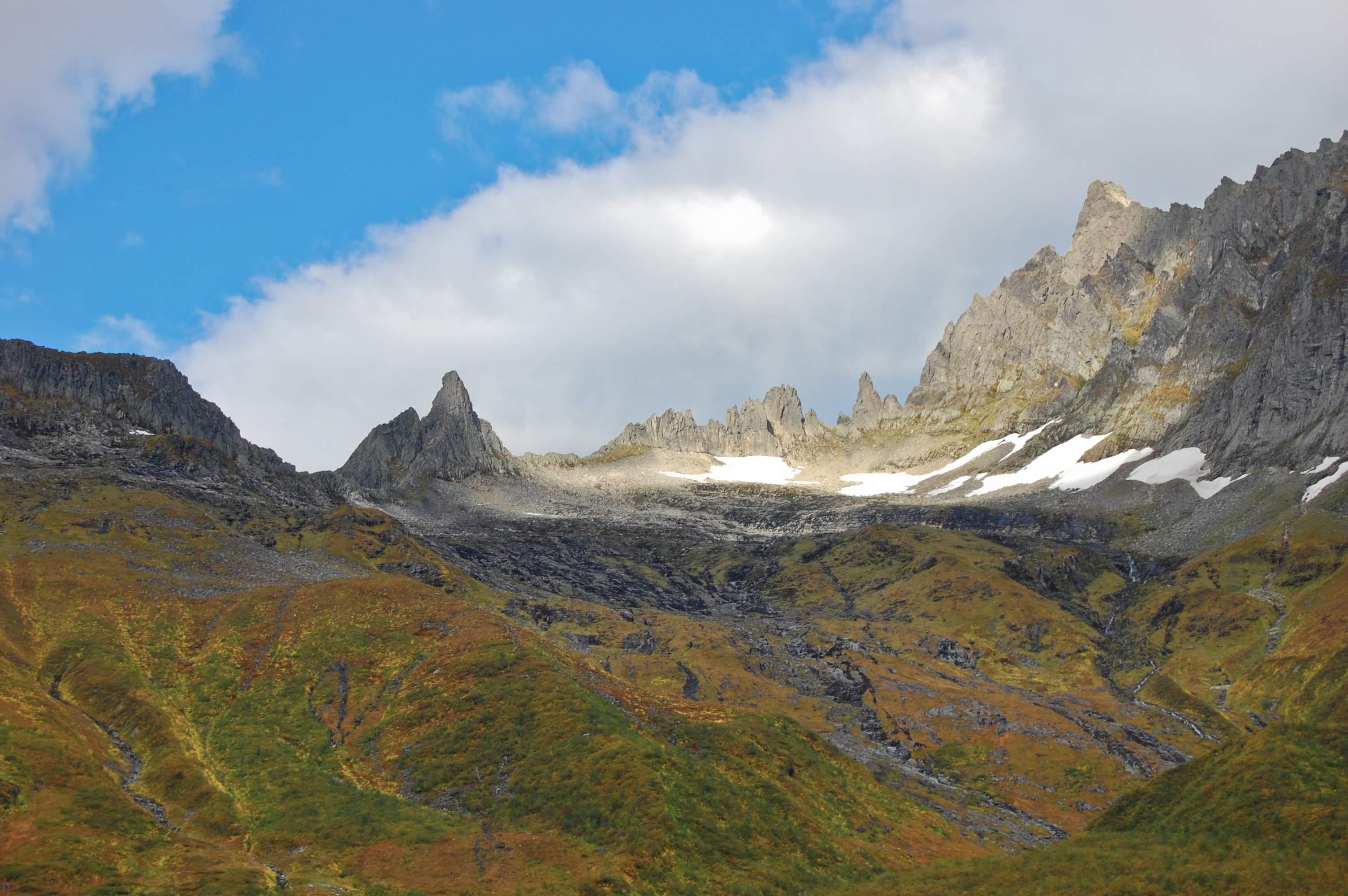 Fingeren 1180 moh. Fjell, fjelltopp i Sunnmørsalpene i Ørsta kommune i Møre og Romsdal, Norge. Turen opp fra Standalseidet. Fjellet ligger rett ved Kolåstinden.